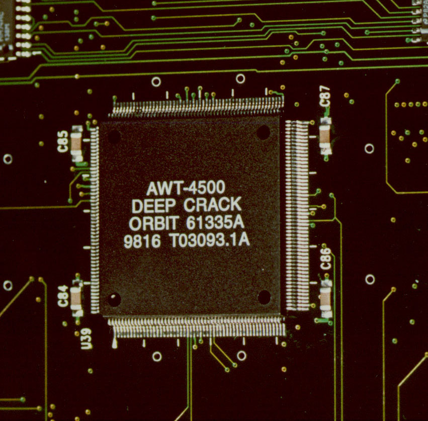 Uno dei chip custom dell'EFF DES cracker